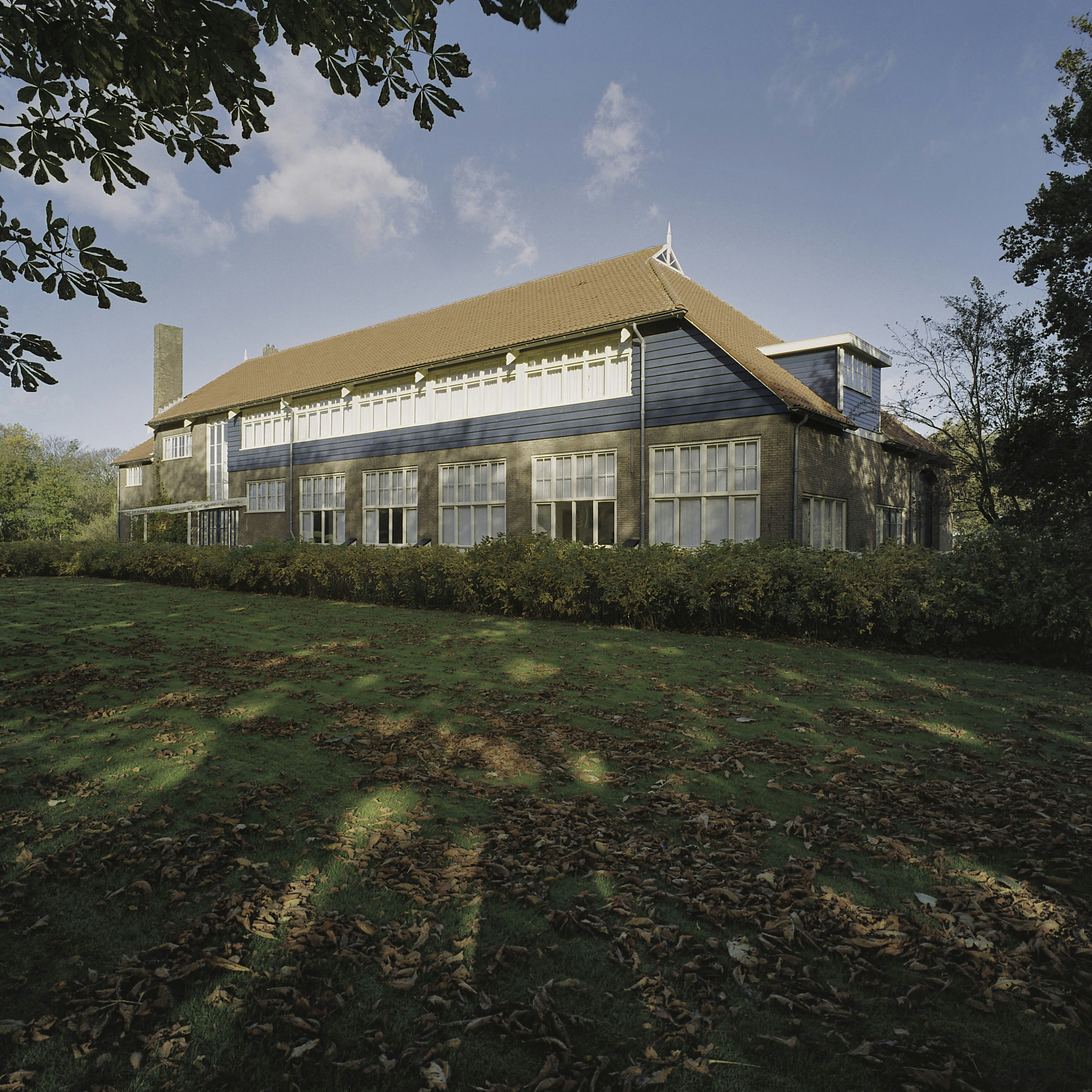 Gemeenschapsgebouw met dienstwoning aan de kopse zijde (opmerking: Gefotografeerd voor Monumenten In Nederland Noord-Holland)